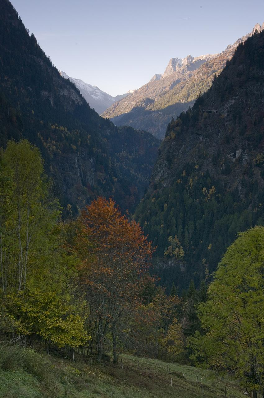 Trient valley, Valais, Switzerland